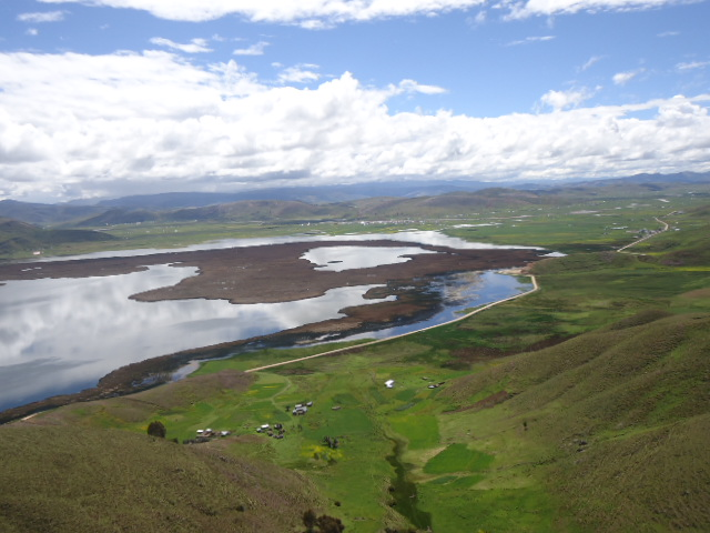 La foto panoramica nos muestra la laguna de orurillo un hermoso espejo de agua ubicado aproximadamente a 3892 msnm alberga un infinidad de flora y fauna sobresaliendo el flamenco de entre ellos, es un atractivo turistico, navegar en sus aguas son una experiencia inolvidable